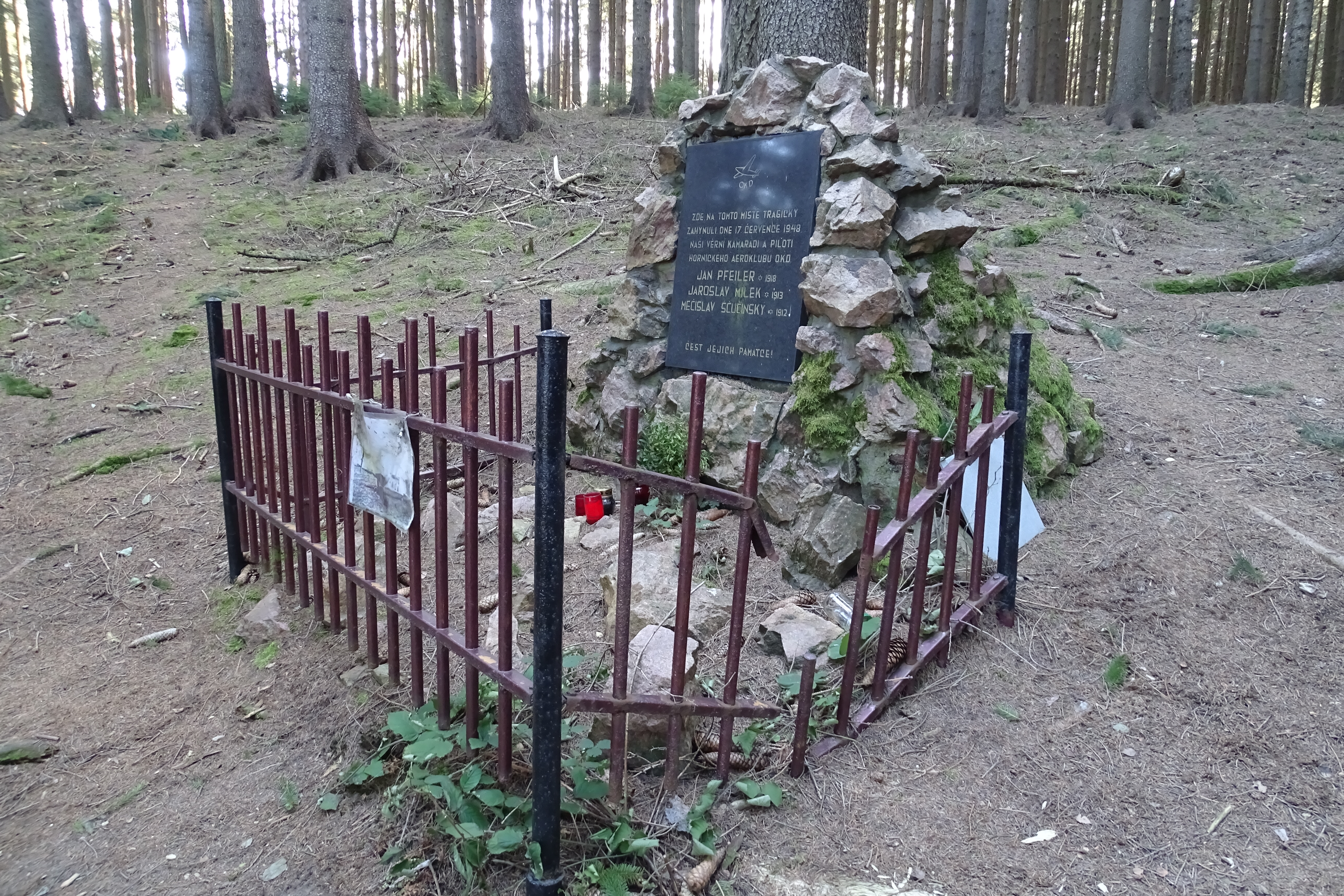 pomník leteckého neštěstí